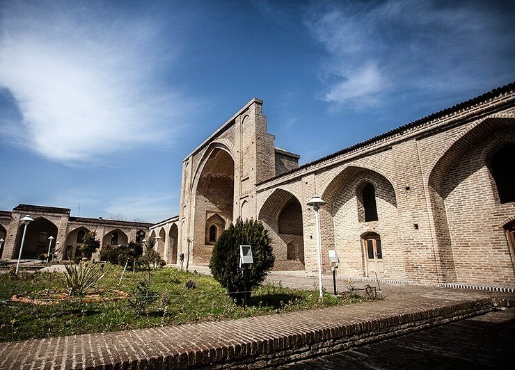 مازِرونی: فرح آباد ساری